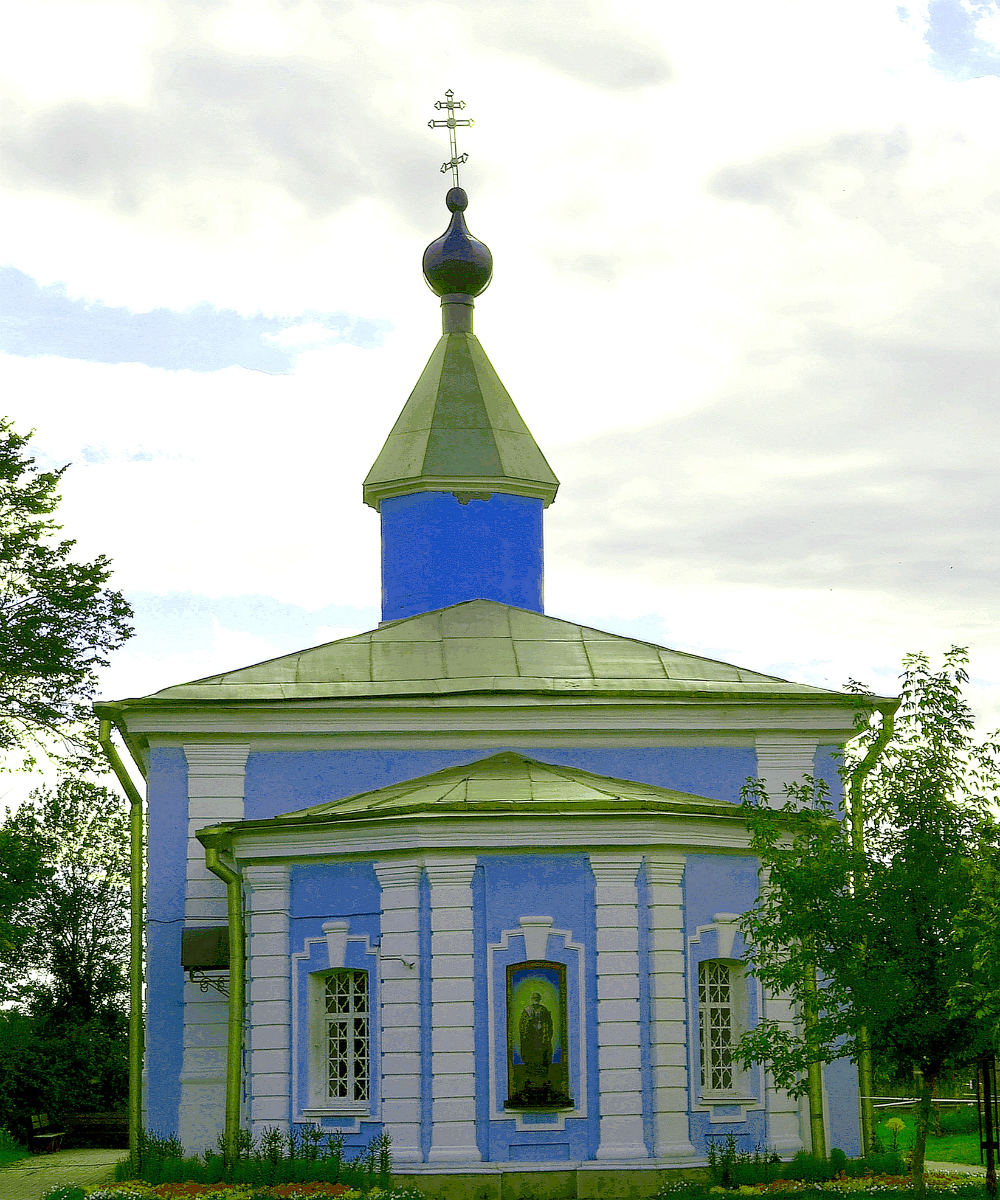 Шлиссельбург. Соборная площадь. Никольская церковь, 1770г